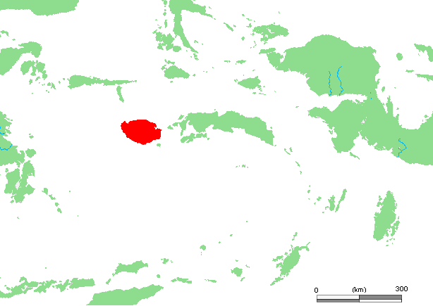 ID Buru.PNG